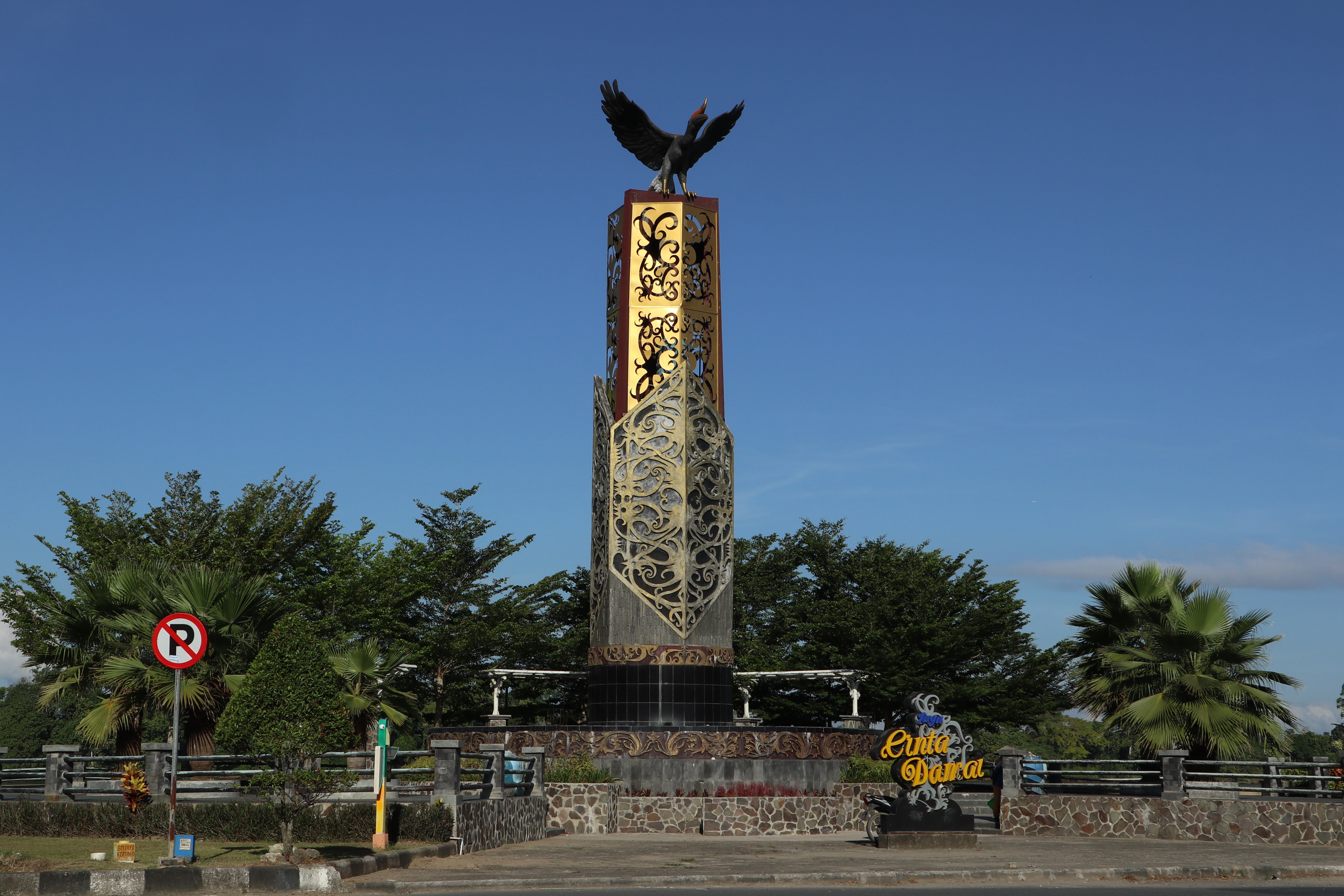 Tugu Cinta Damai di pusat kota Tanjung Selor, Kabupaten Bulungan.